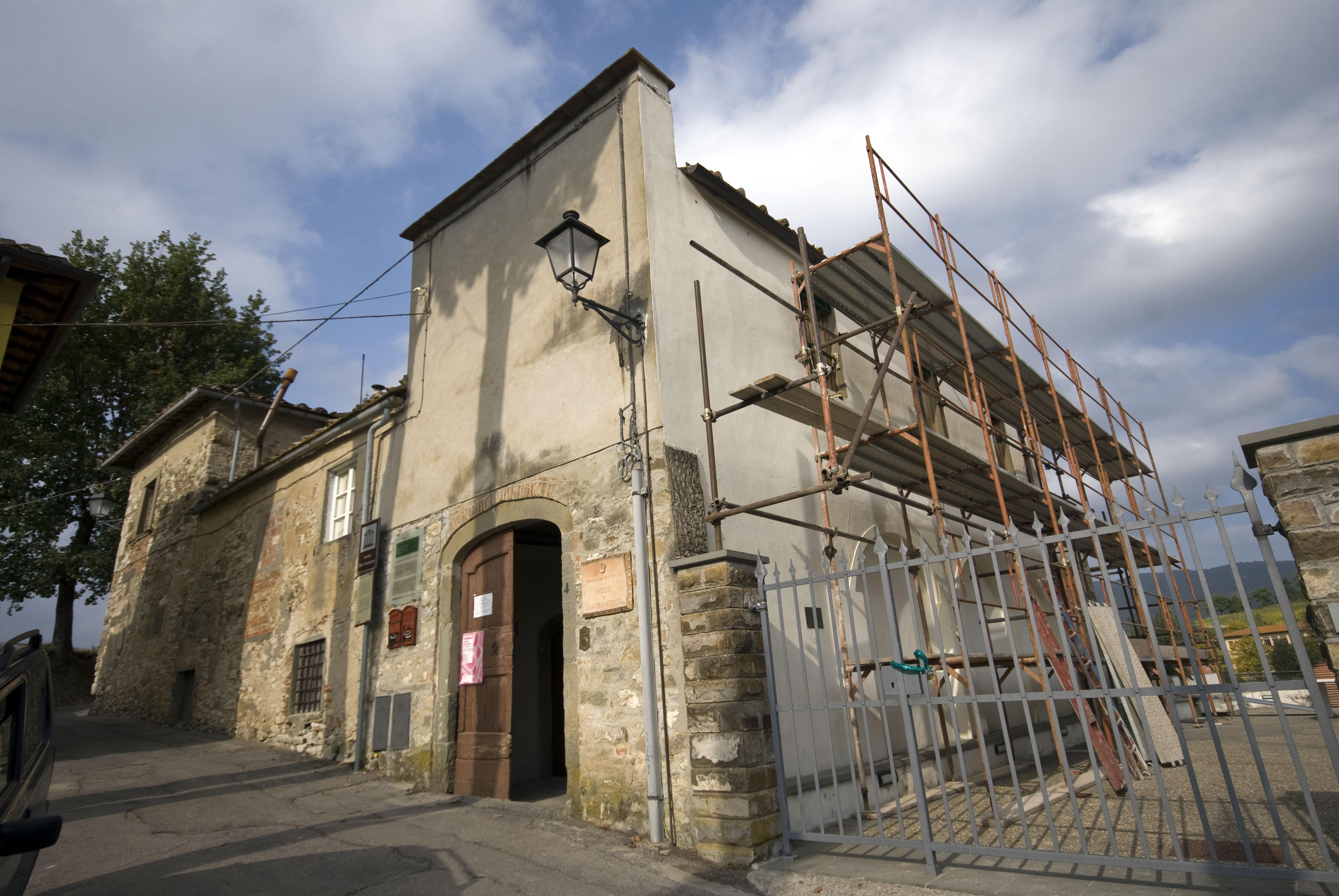 Museo di arte sacra a Greve in Chianti- Ingresso